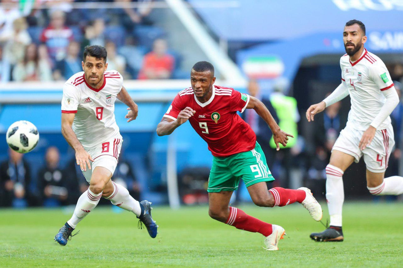 بازی تیم فوتبال ایران و مراکش در جام جهانی ۲۰۱۸